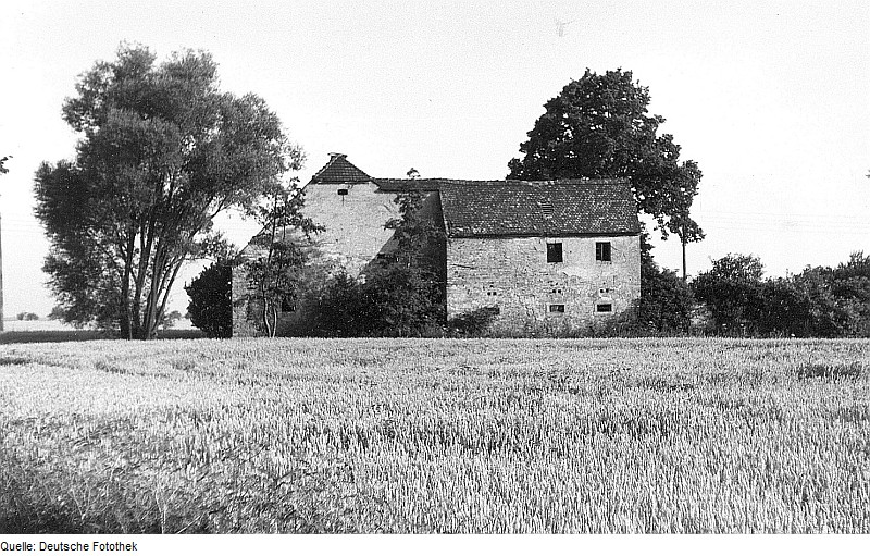 Original image description from the Deutsche Fotothek Neschwitz-Krinitz. Ehem. Mühle, Ansicht